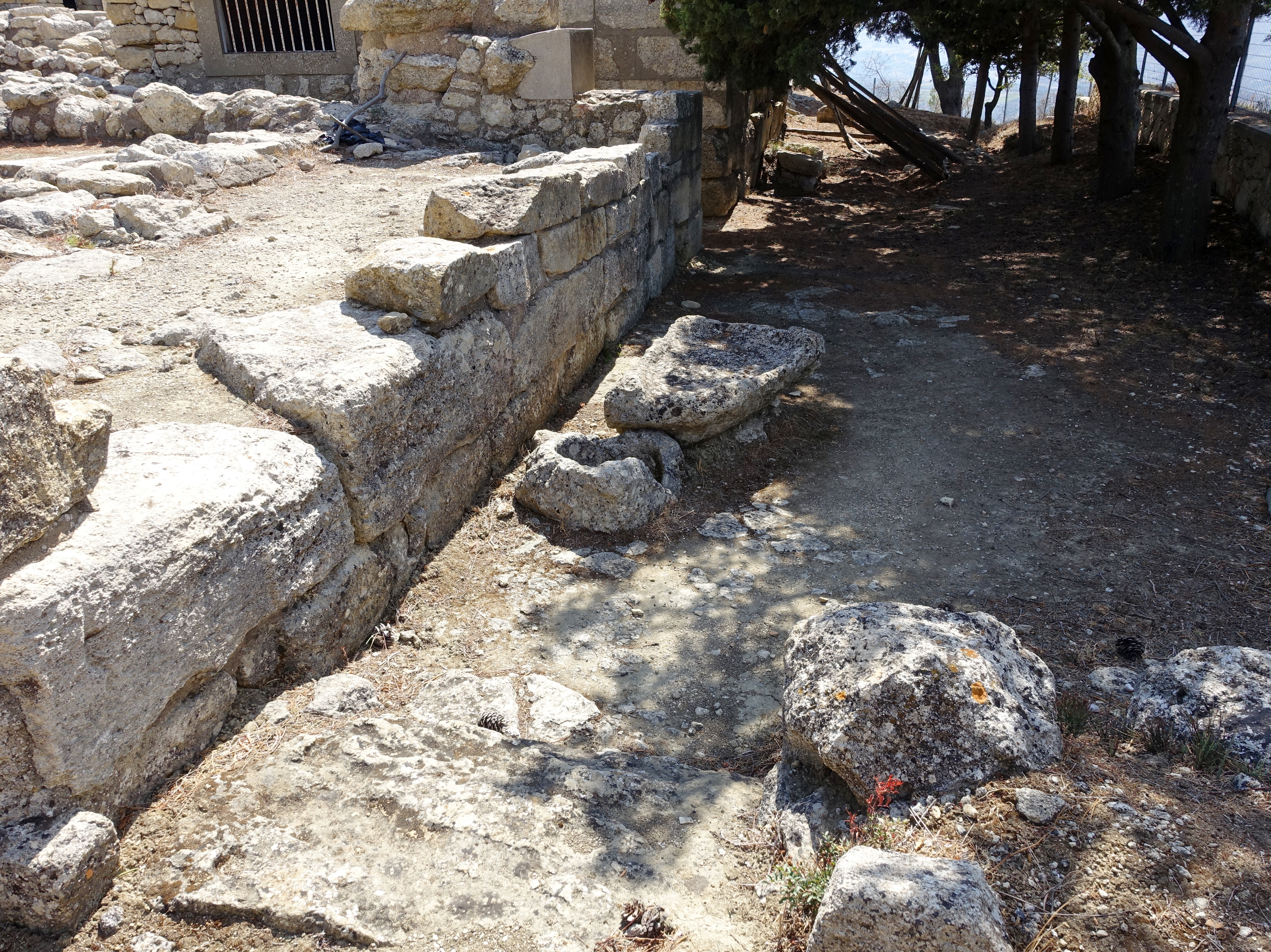 Ausgrabungsstätte der „Villa“ von Vathypetro (Βαθύπετρο), Gemeinde Archanes-Asterousia, Kreta, Griechenland